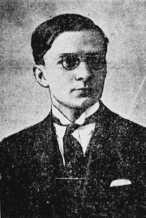 "G. Bidault, agrégé de l'Université, membre du conseil national du P.D.P.".